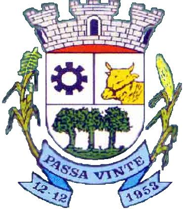 Brasão de armas do município de Passa Vinte, MG, Brasil.